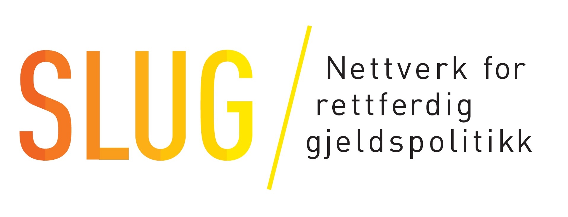 Dette er SLUGs logo.